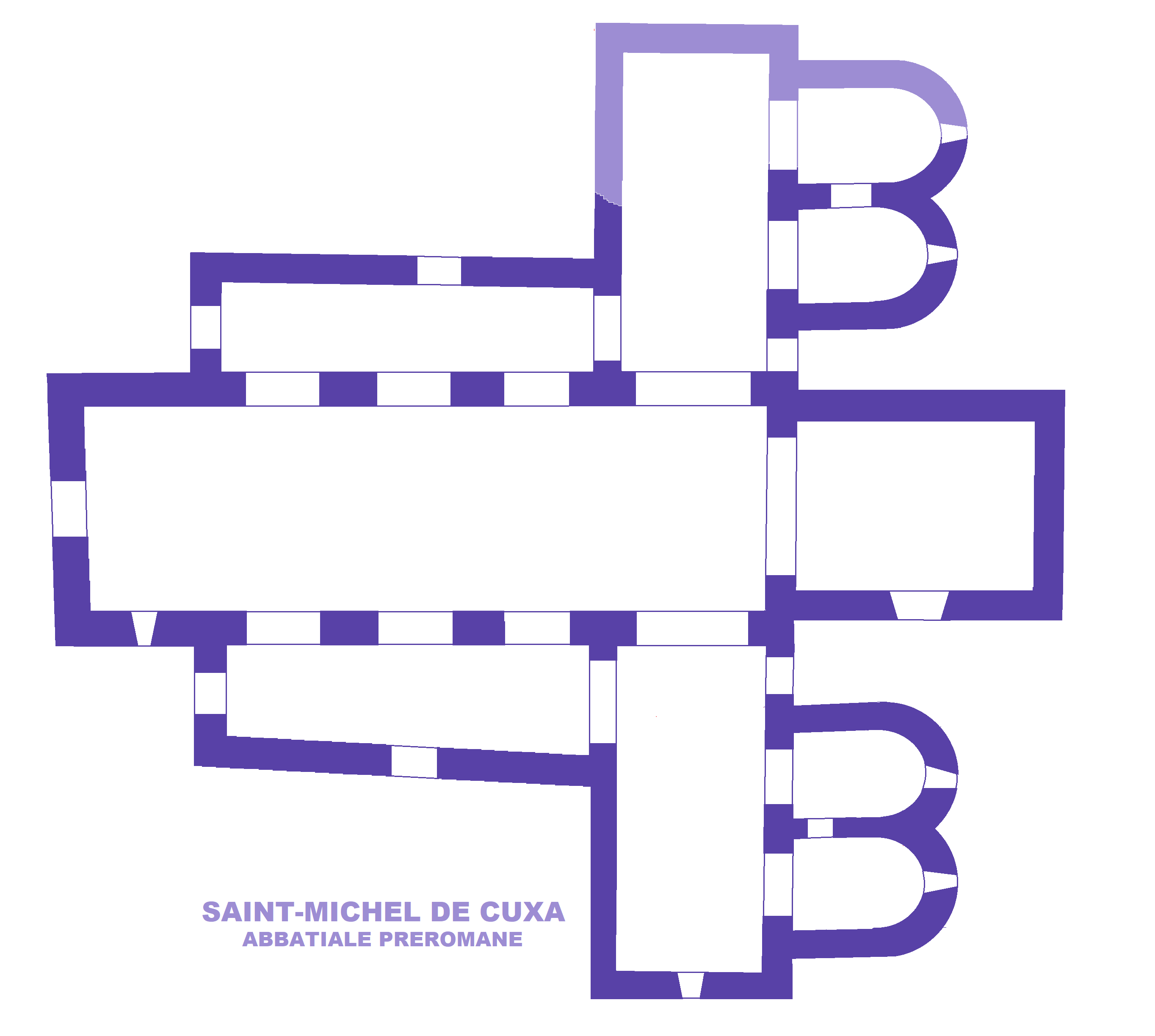 Abbaye Saint-Michel de Cuxa, Plan préroman